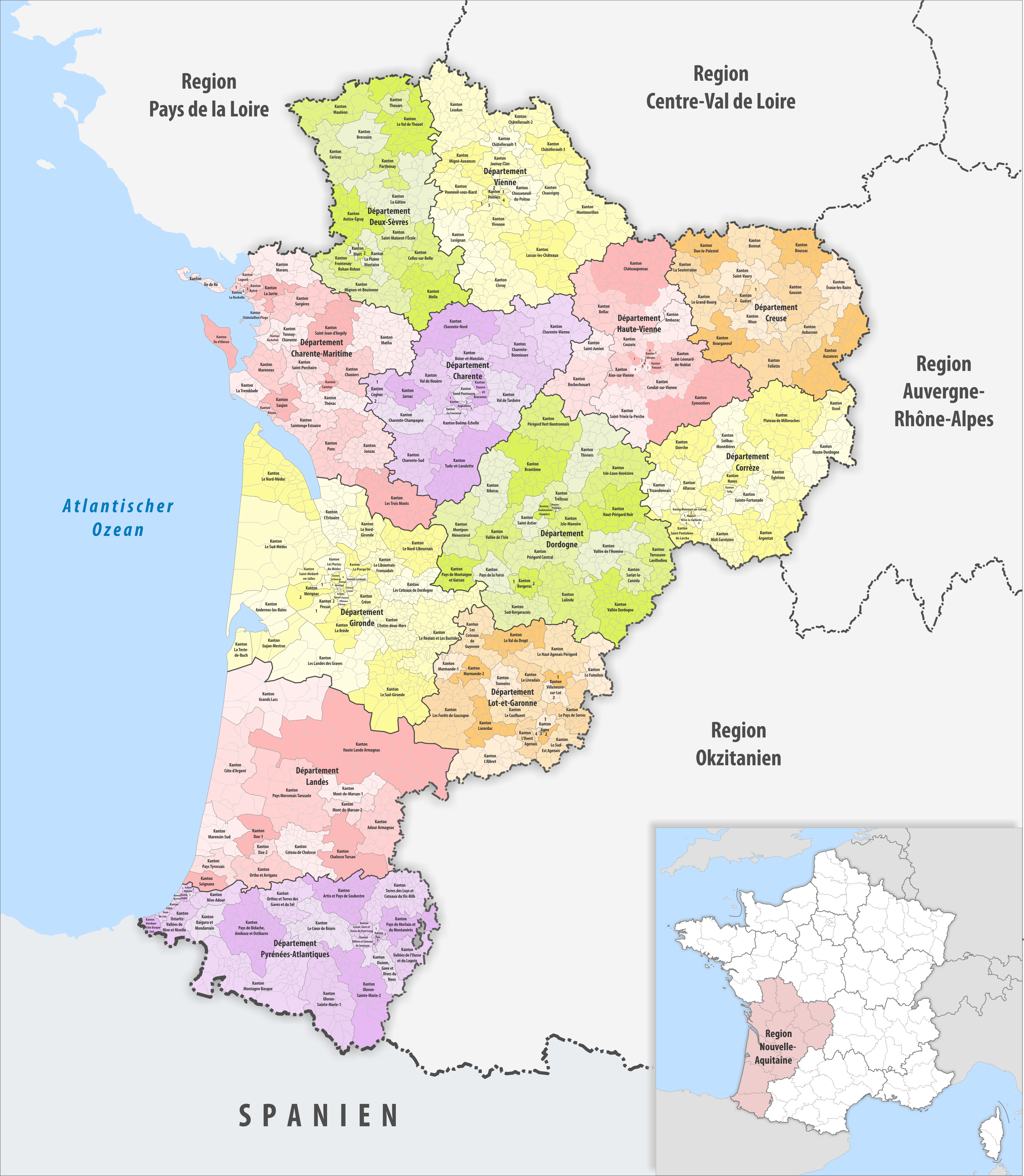 Gemeinden, Kantone und Departemente in der Region Nouvelle-Aquitaine